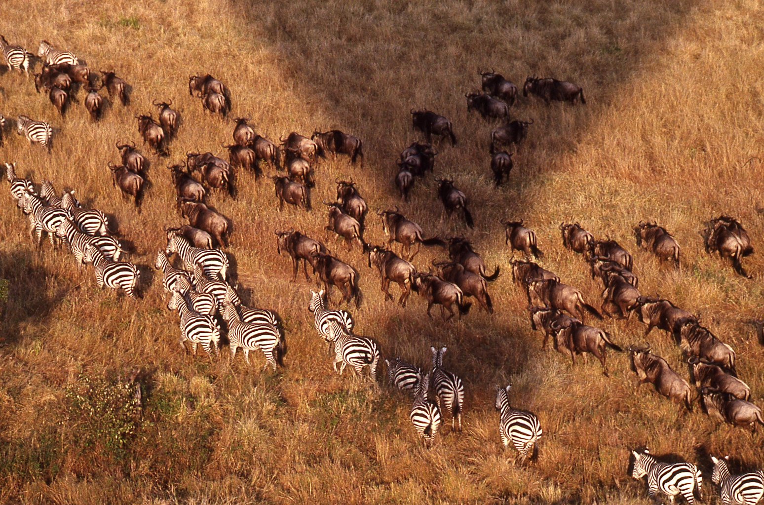 Maasai_Mara_341.jpg KENYA